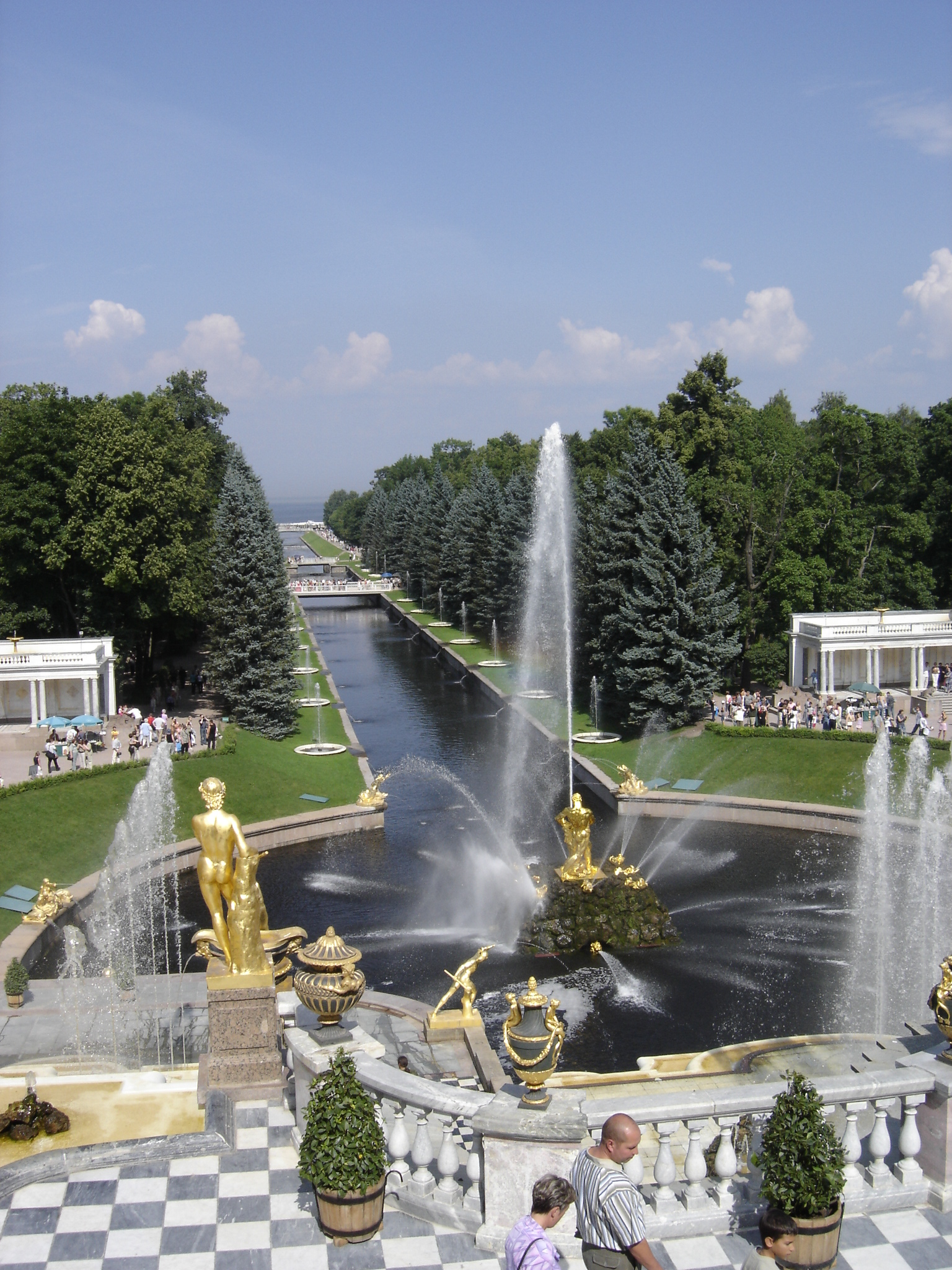 Palais de Peterhof (Petrodvorets)